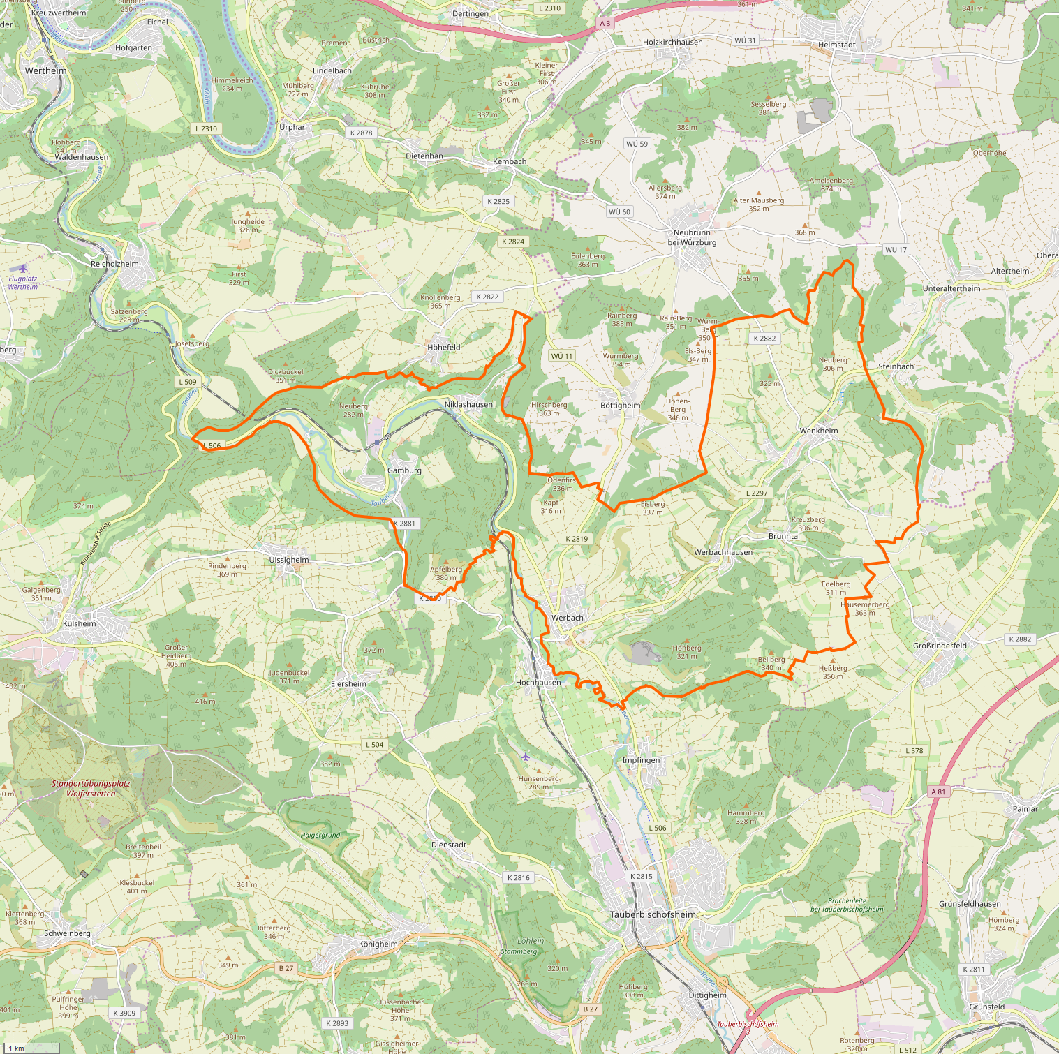 Gemarkung und Lage der Gemeinde Werbach. Siehe auch: Liste der Kulturdenkmale in Werbach Liste der Straßennamen von Werbach Gemarkungen und Lagen der Städte und sonstigen Gemeinden im Main-Tauber-Kreis: Ahorn · Assamstadt · Bad Mergentheim · Boxberg · Creglingen · Freudenberg · Großrinderfeld · Grünsfeld · Igersheim · Königheim · Külsheim · Lauda-Königshofen · Niederstetten · Tauberbischofsheim · Weikersheim · Werbach · Wertheim · Wittighausen